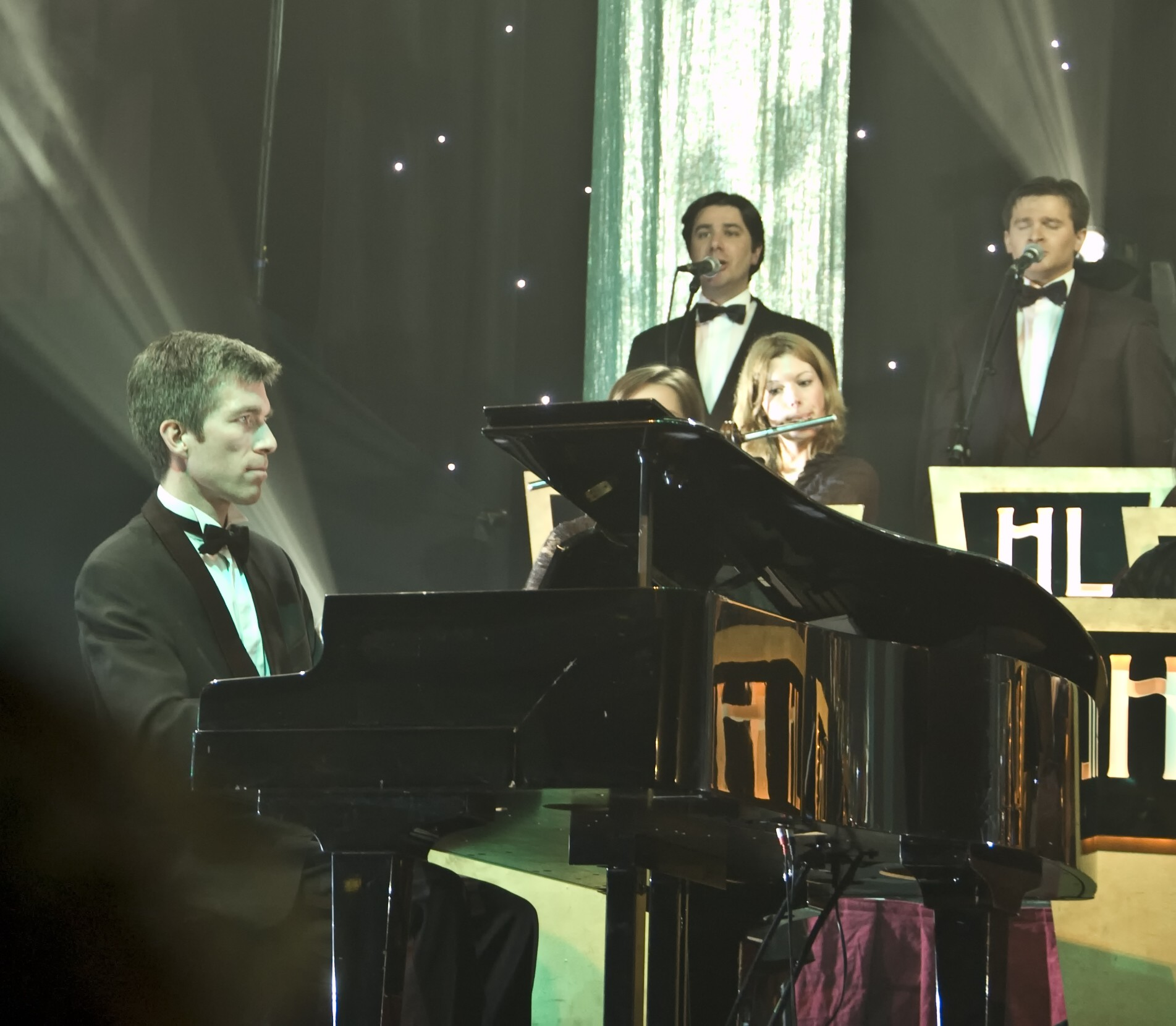 Arrangeur und Pianist Wim Bohets bei einem Konzert Helmut Lottis in Nürnberg 2008.